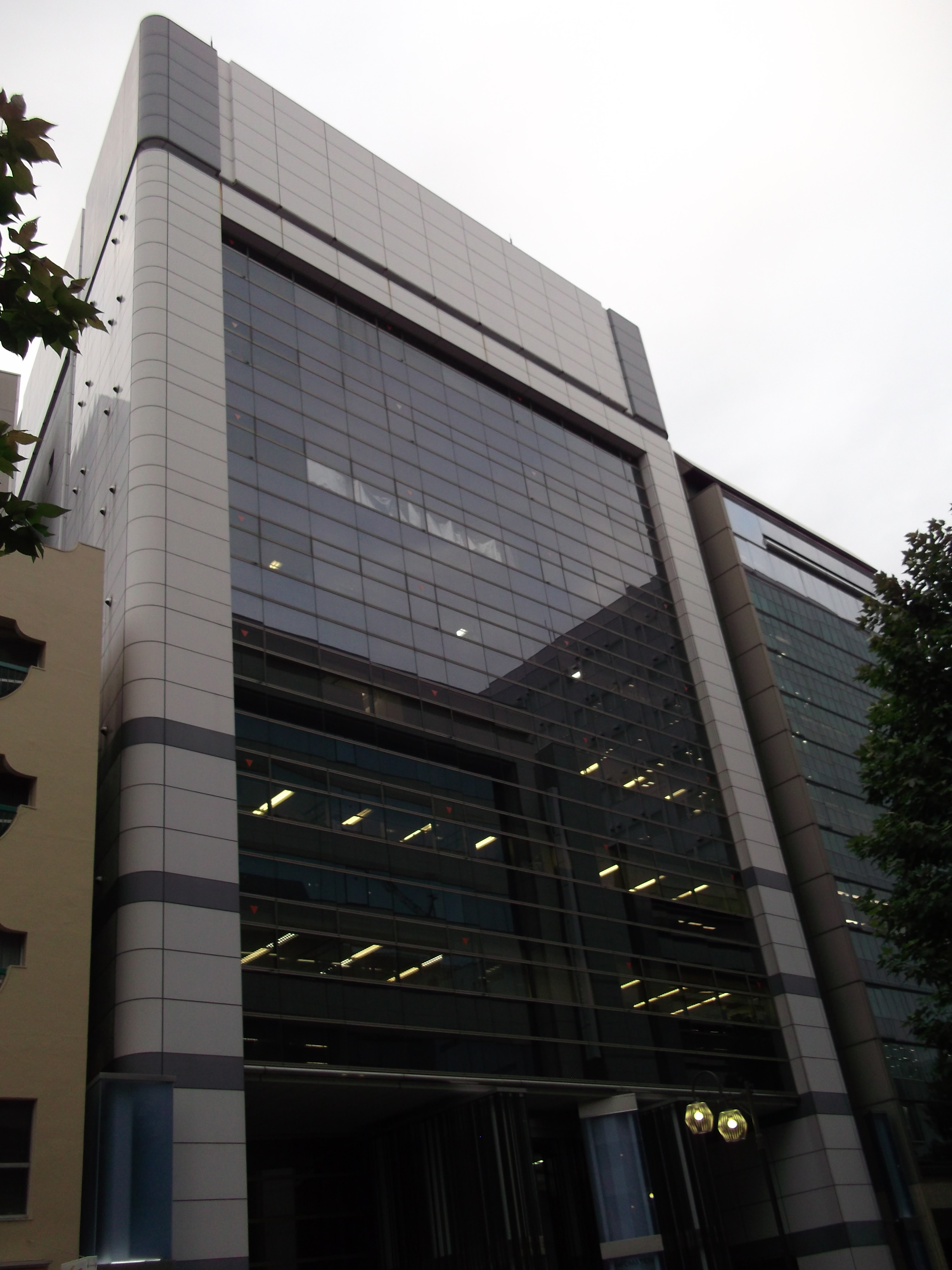 名古屋市中区のステージ錦を南側公道西側より撮影